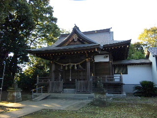 初富稲荷神社拝殿